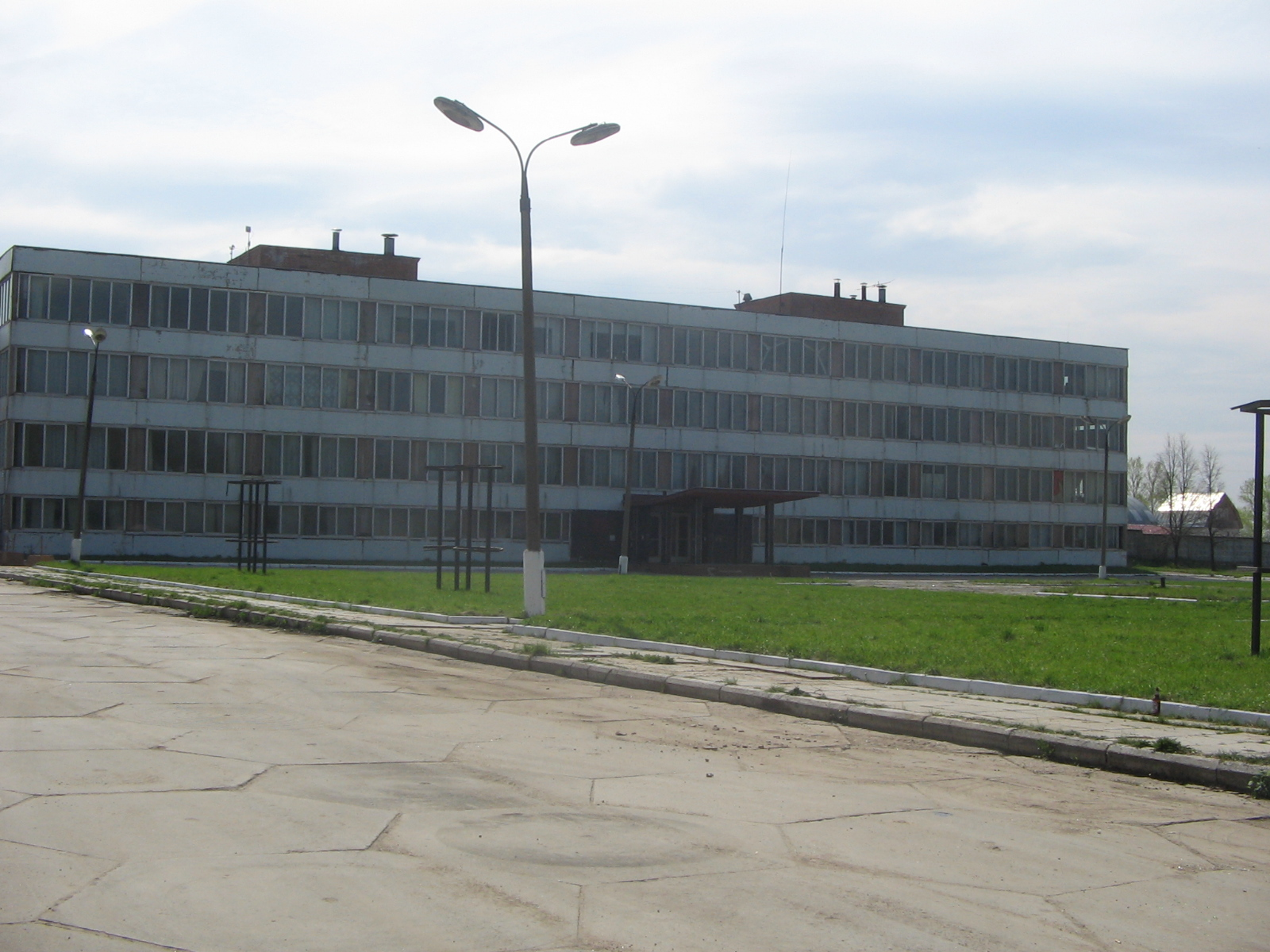 ЦМИС г.Солнечногорск. (Центральная машиносипытательная станция)